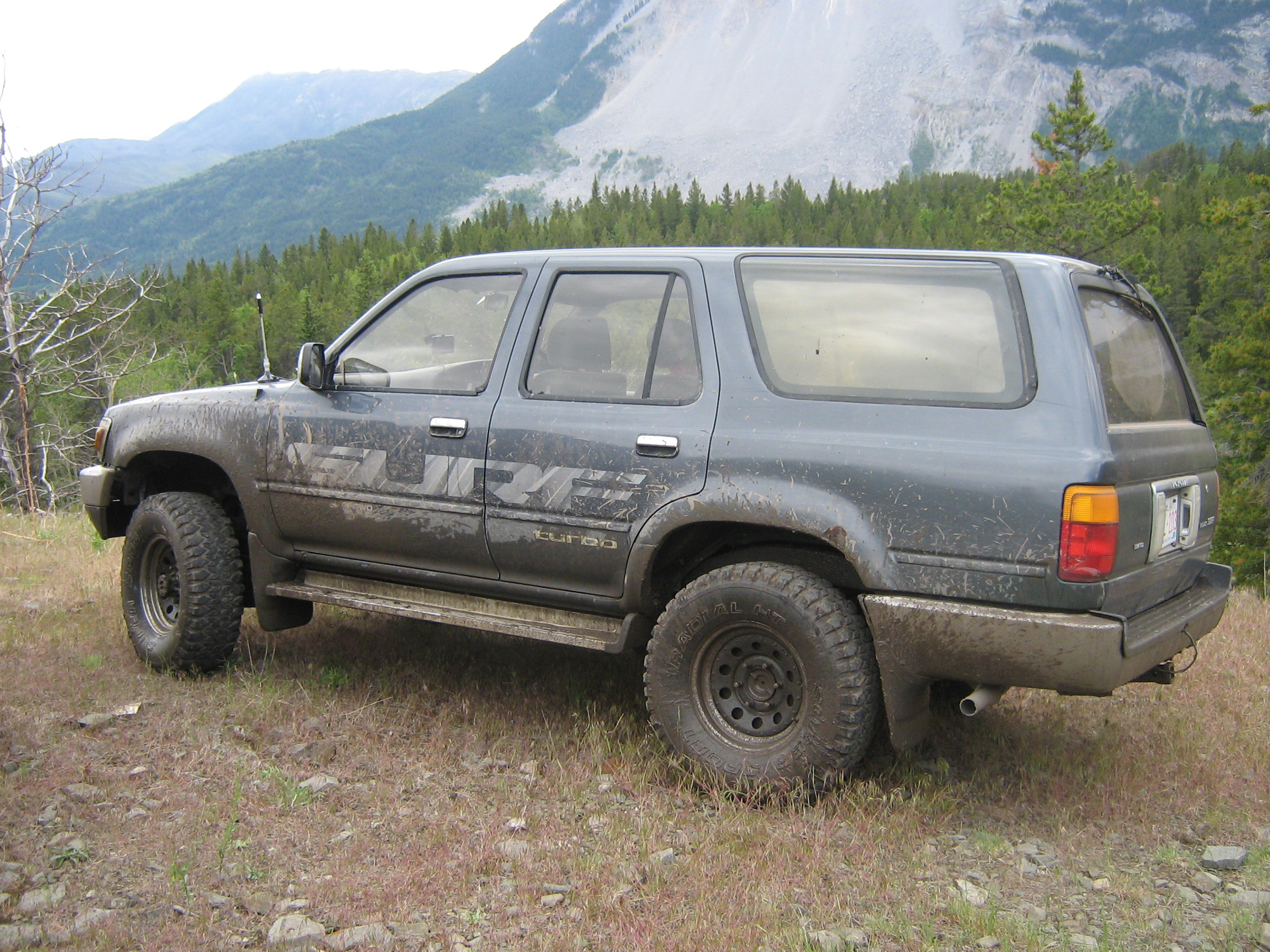 1989 Toyota Hilux SURF